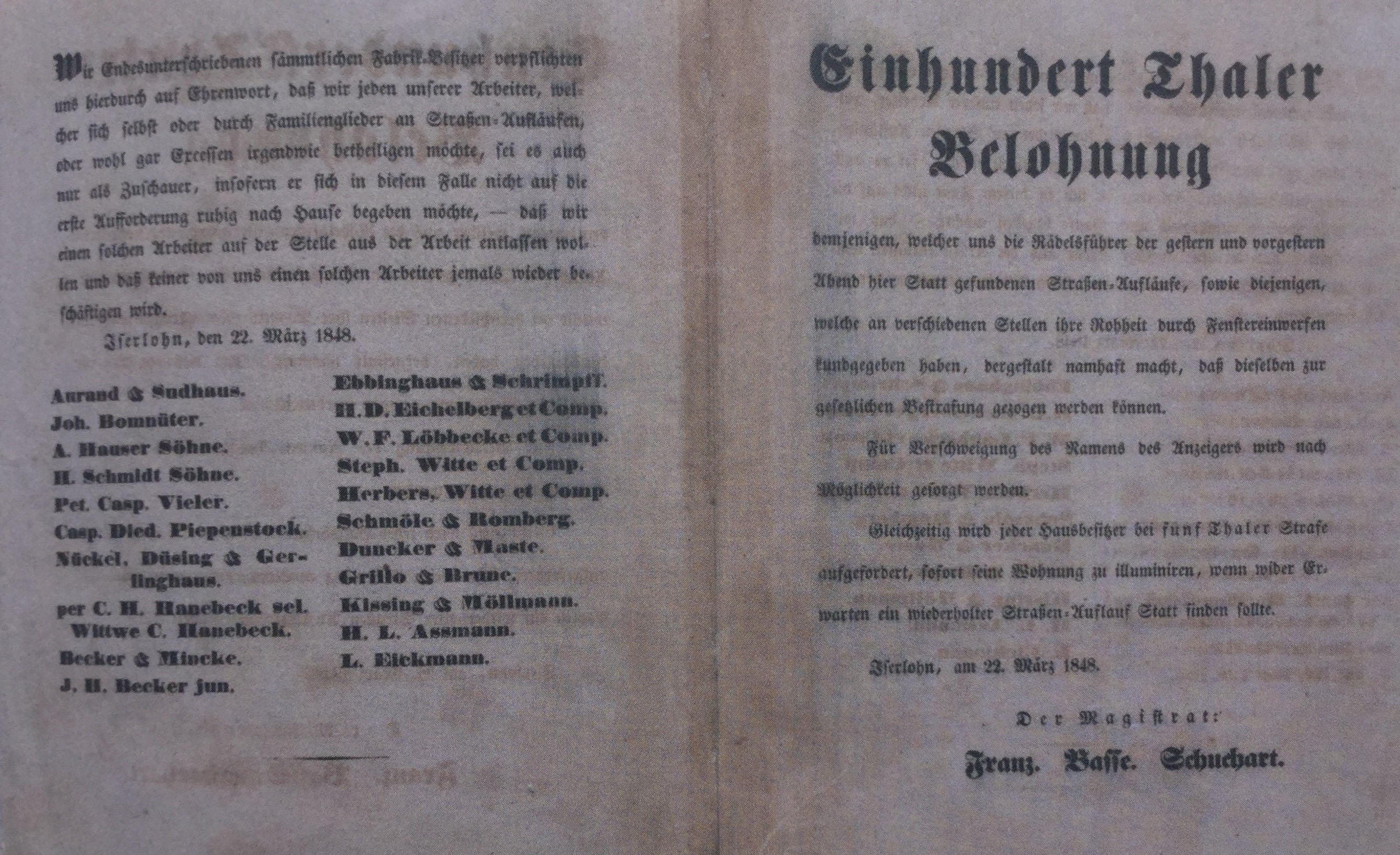 Steckbrief des Iserlohner Magistrat zur Ergreifung der Rädelsführer des Iserlohner Aufstandes von 1848